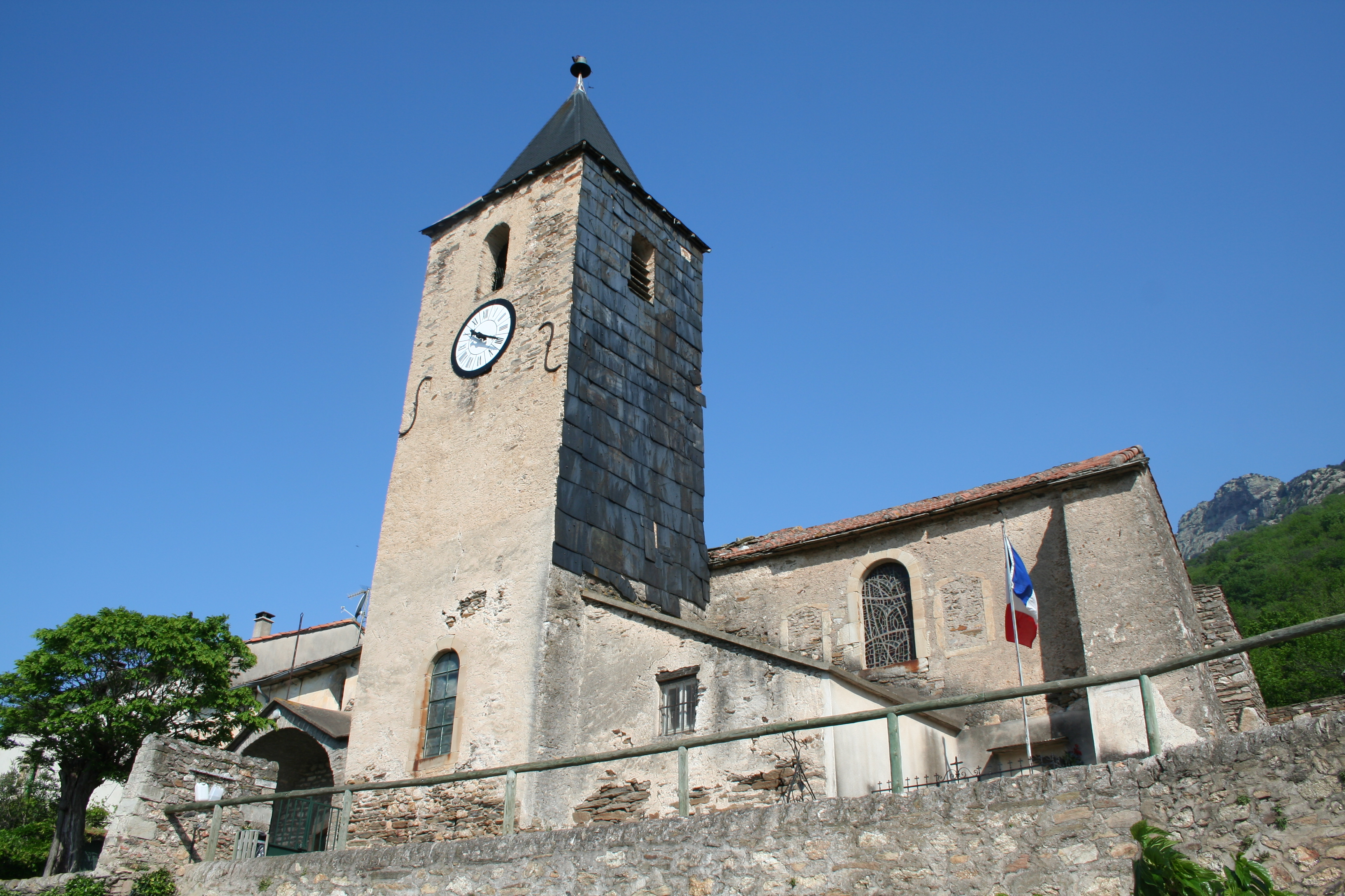 Colombières-sur-Orb (Hérault) - église Saint-Pierre.